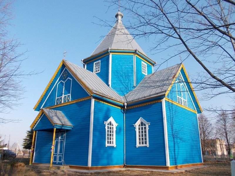 Будча. Драўляная царква